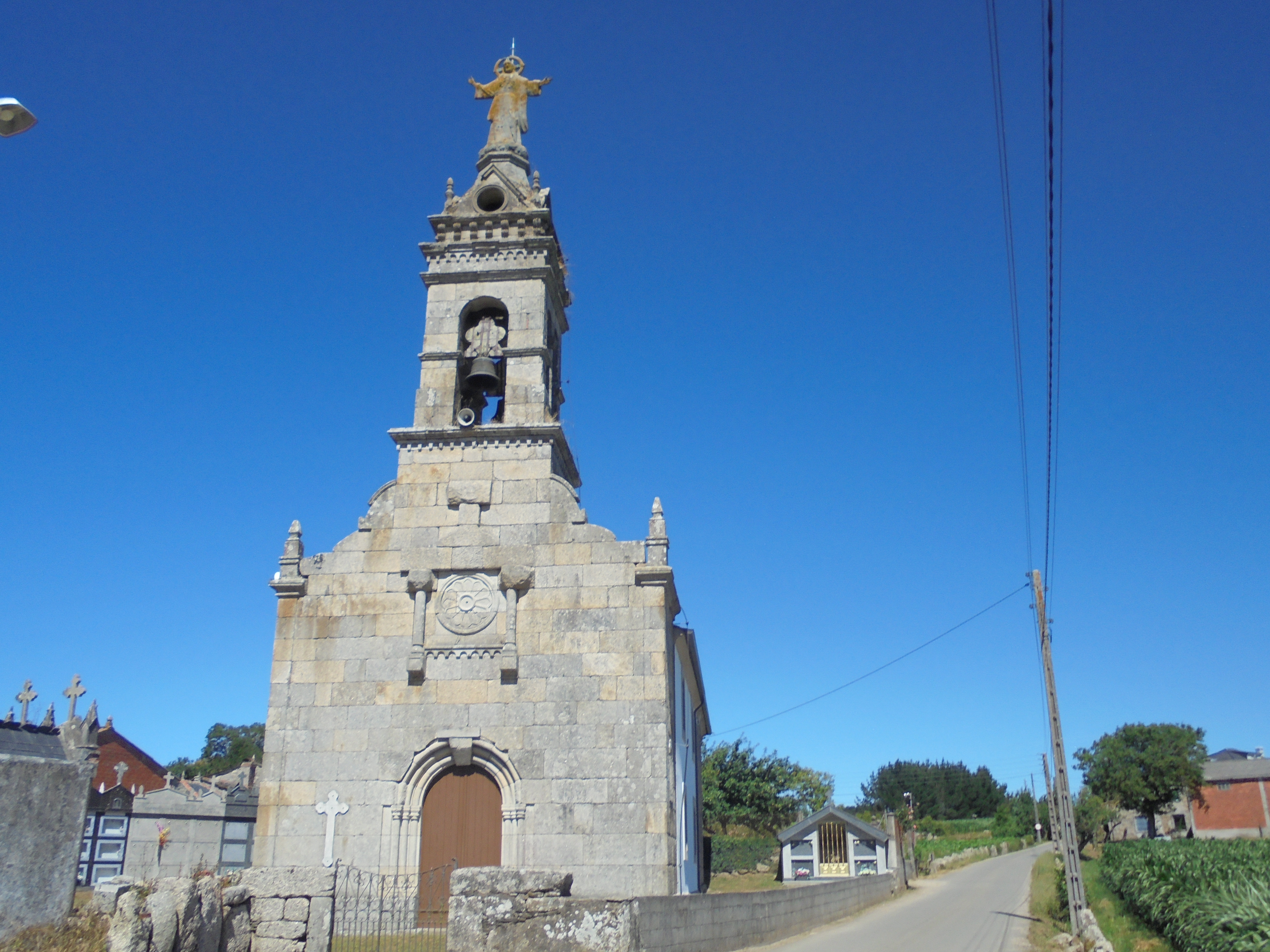 Igrexa parroquial de Benade ( Lugo)